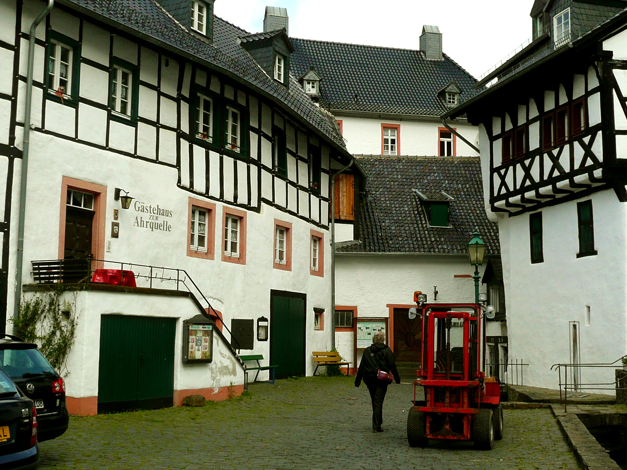 La source de l'Ahr à Blankenheim, en Rhénanie-Westphalie. Hotel Gästehaus Ahrquelle.